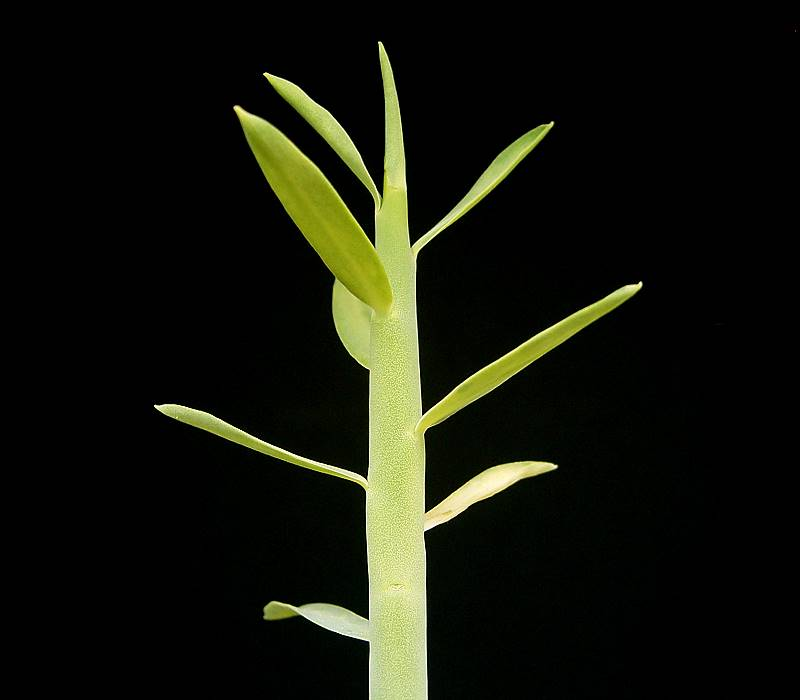 Euphorbia lateriflora